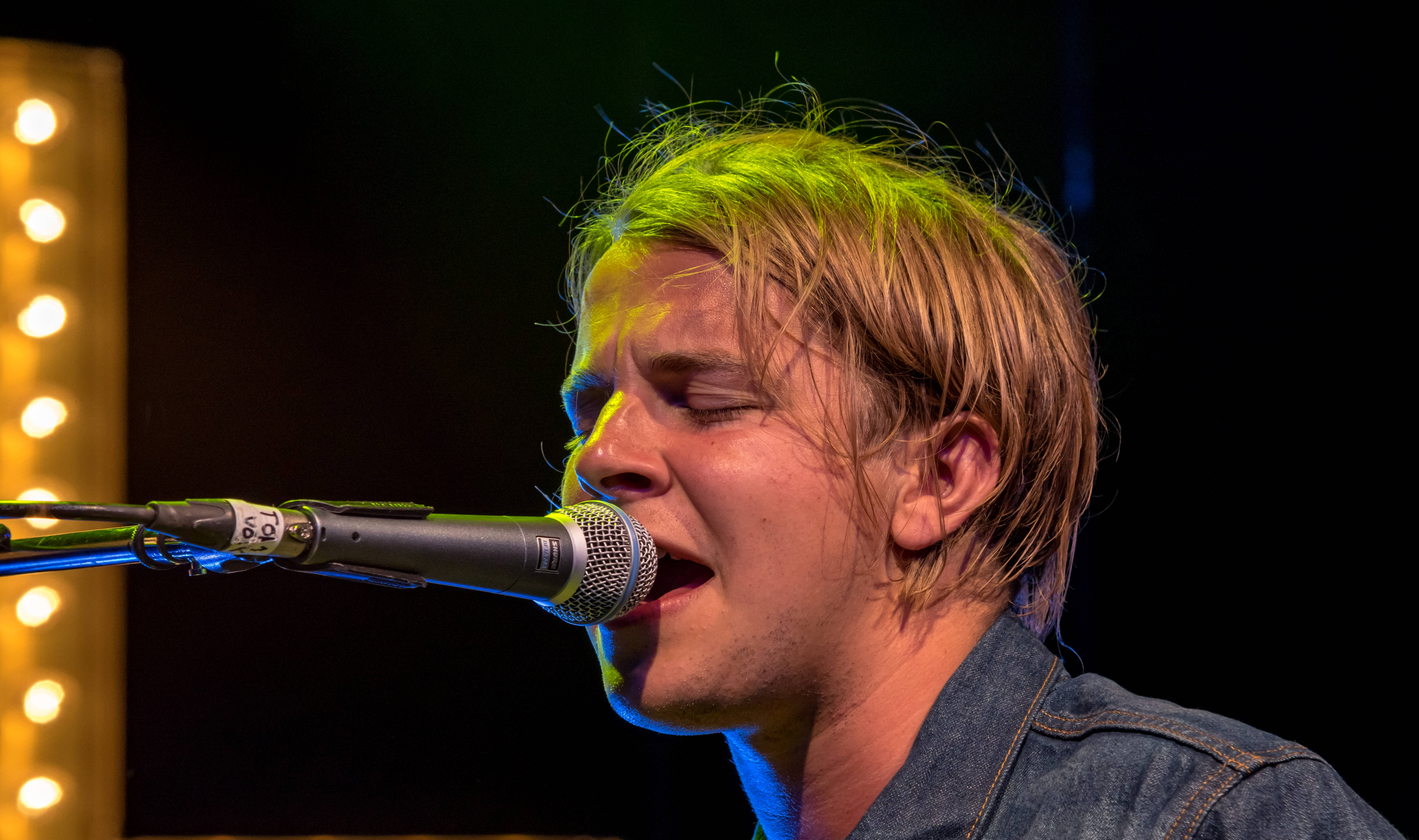 Bilder vom ZMF 2015 Tom Odell 16. Juli 2015